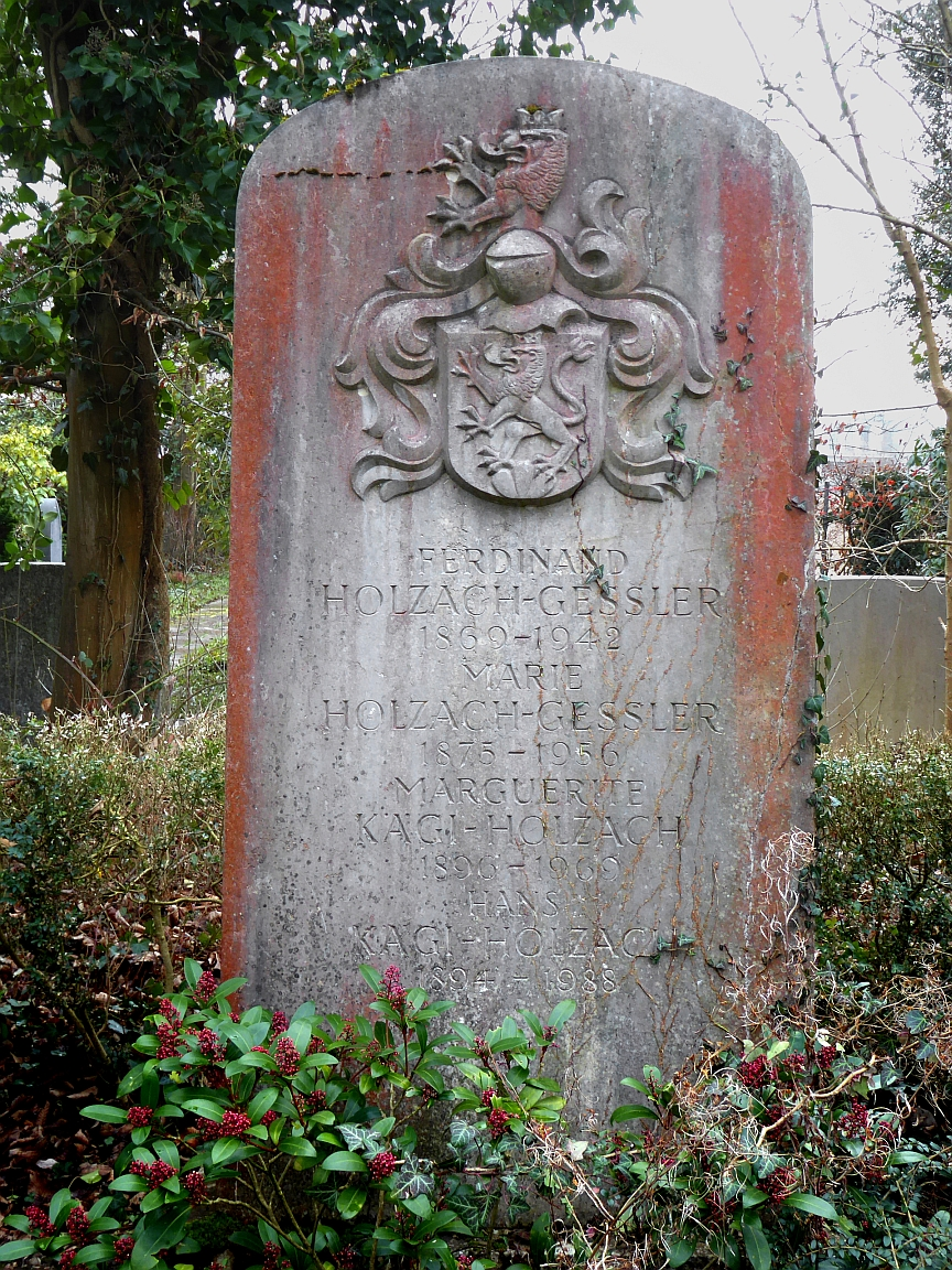 Ferdinand Holzach-Gessler (1869–1942), Dr. phil., Historiker, Rektor der Knabenprimarschule, Politiker, Familiengrab auf dem Friedhof Hörnli, Riehen, Basel-Stadt